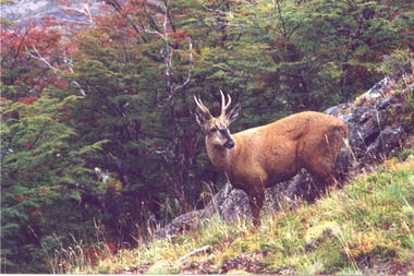 Animal en peligro de extinción, en los bosques subantárticos de Chile y Argentina